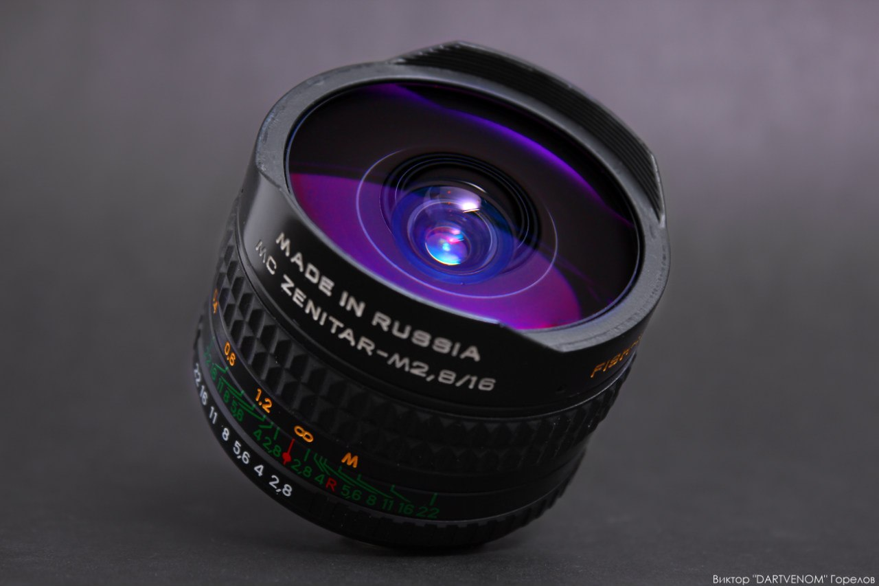 Сверхширокоугольный объектив «МС Зенитар-М» 2,8/16